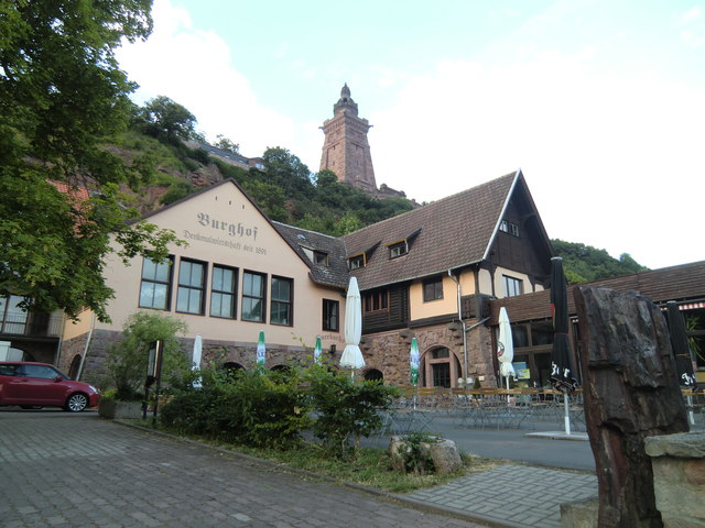 Burghof mit Kyffhäuserdenkmal